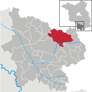 Sonnewalde in Brandenburg (Country) - District Elbe-Elster